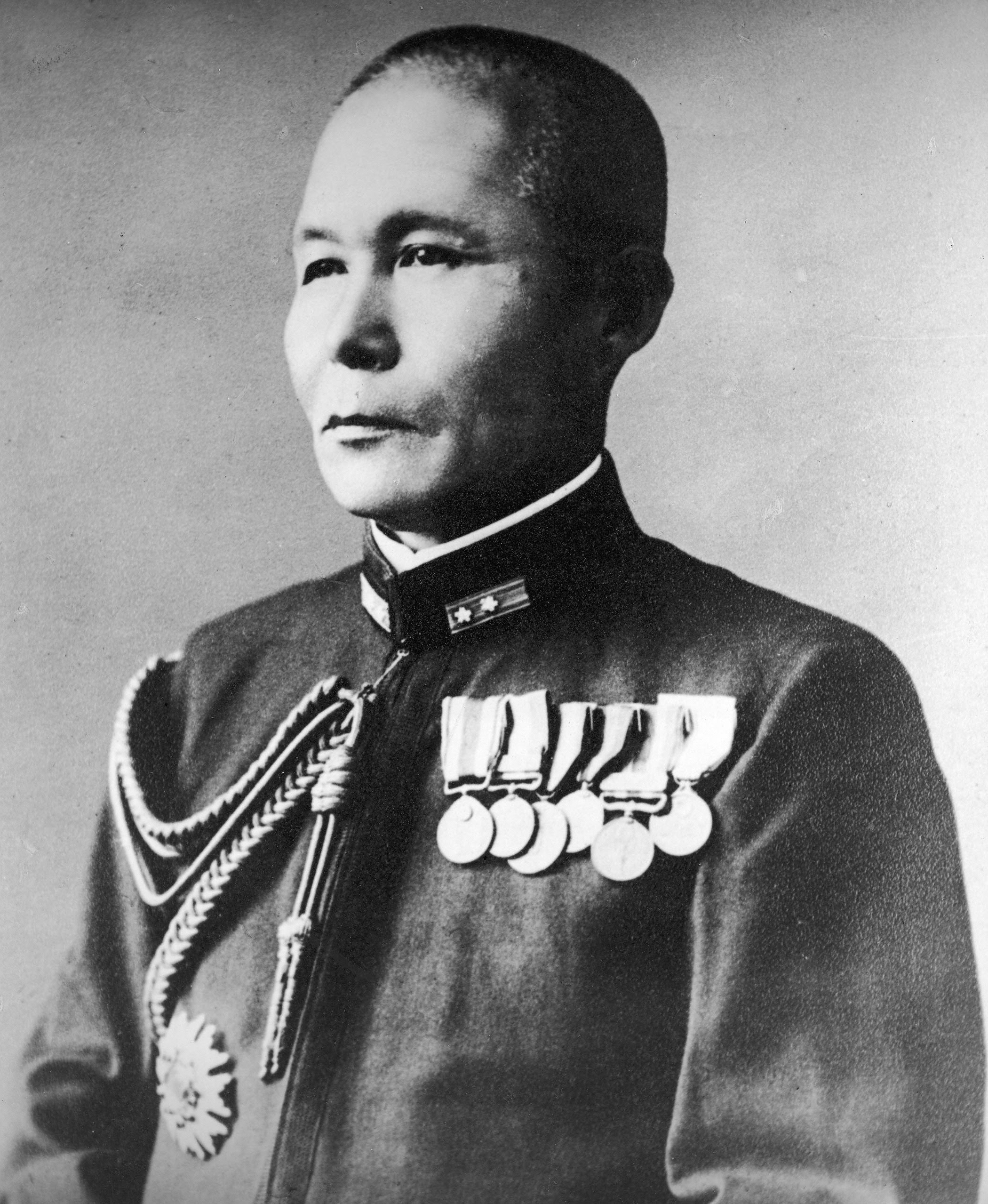 軍令部次長時代の小沢治三郎。 Vice Admiral Jisaburō Ozawa of the Imperial Japanese Navy, when he was the Vice-Chief of the Naval General Staff.